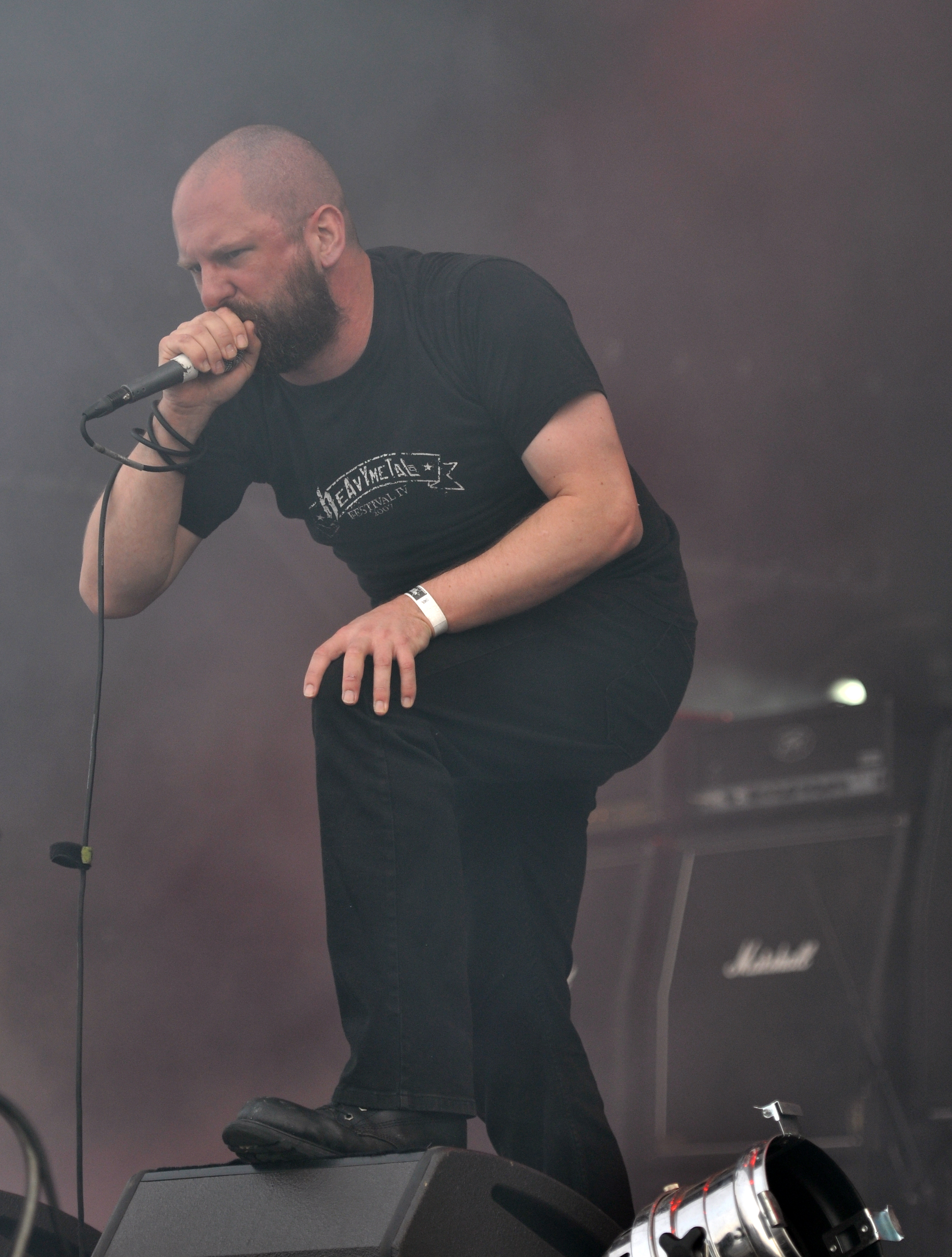 Anaal Nathrakh at Party.San Metal Open Air 2013